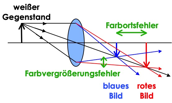 Farbperspektive: Kurzwelliges, blaues Licht wird stärker gebrochen als langwelliges, rotes Licht (Dispersion). Das führt dazu, dass das blaue Bild eines Gegenstandes näher an der Linse liegt (Farbortsfehler) und gleichzeitig kleiner ist als das rote Bild (Farbvergrößerungsfehler). Daraus, dass das blaue Bild kleiner ist, schließen wir, der blaue Gegenstand läge weiter weg.